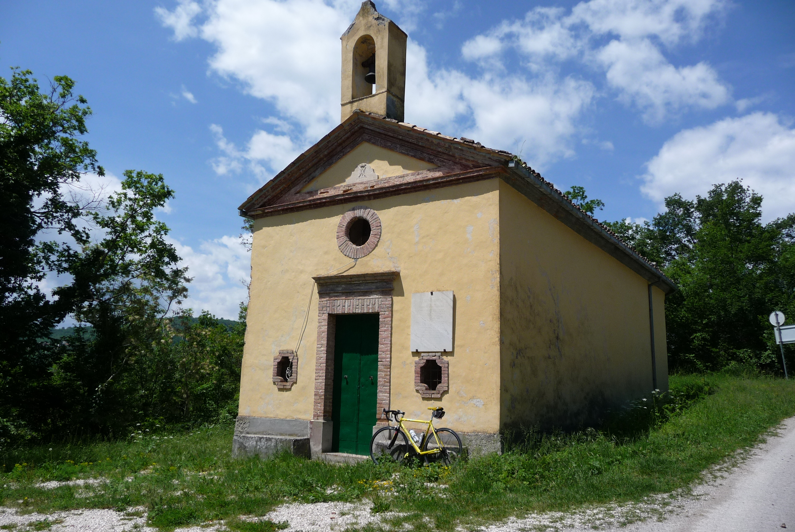 Lucio De Marcellis, La chiesa di Santa Barbara in Ioanella, licenza GFDL